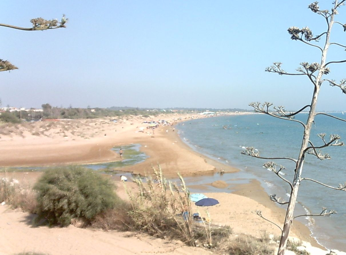 Santa Maria del Focallo - Veduta del litorale Ispicese